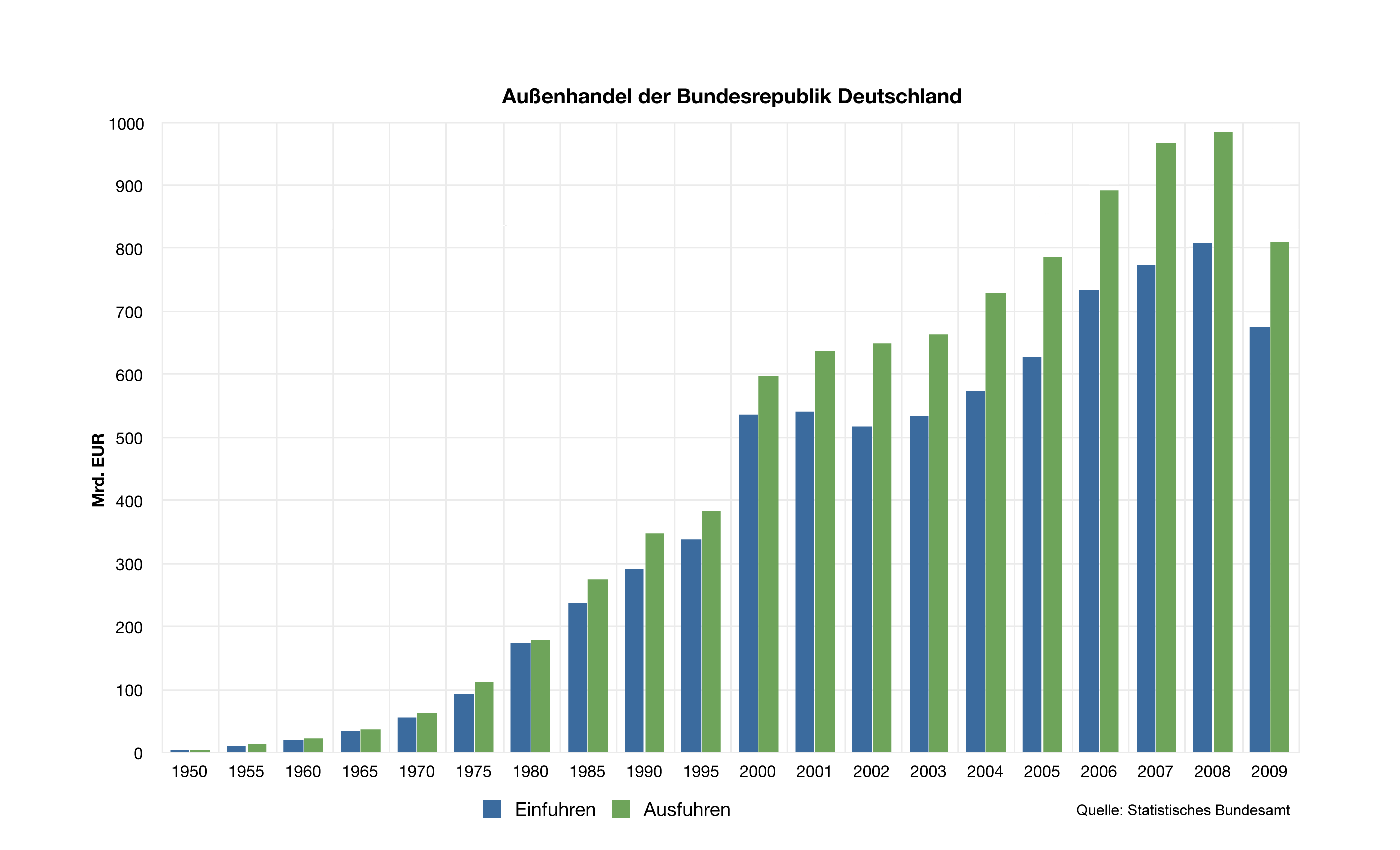 Entwicklung des Außenhandles der Bundesrepublik Deutschland seit dem Jahr 1950.